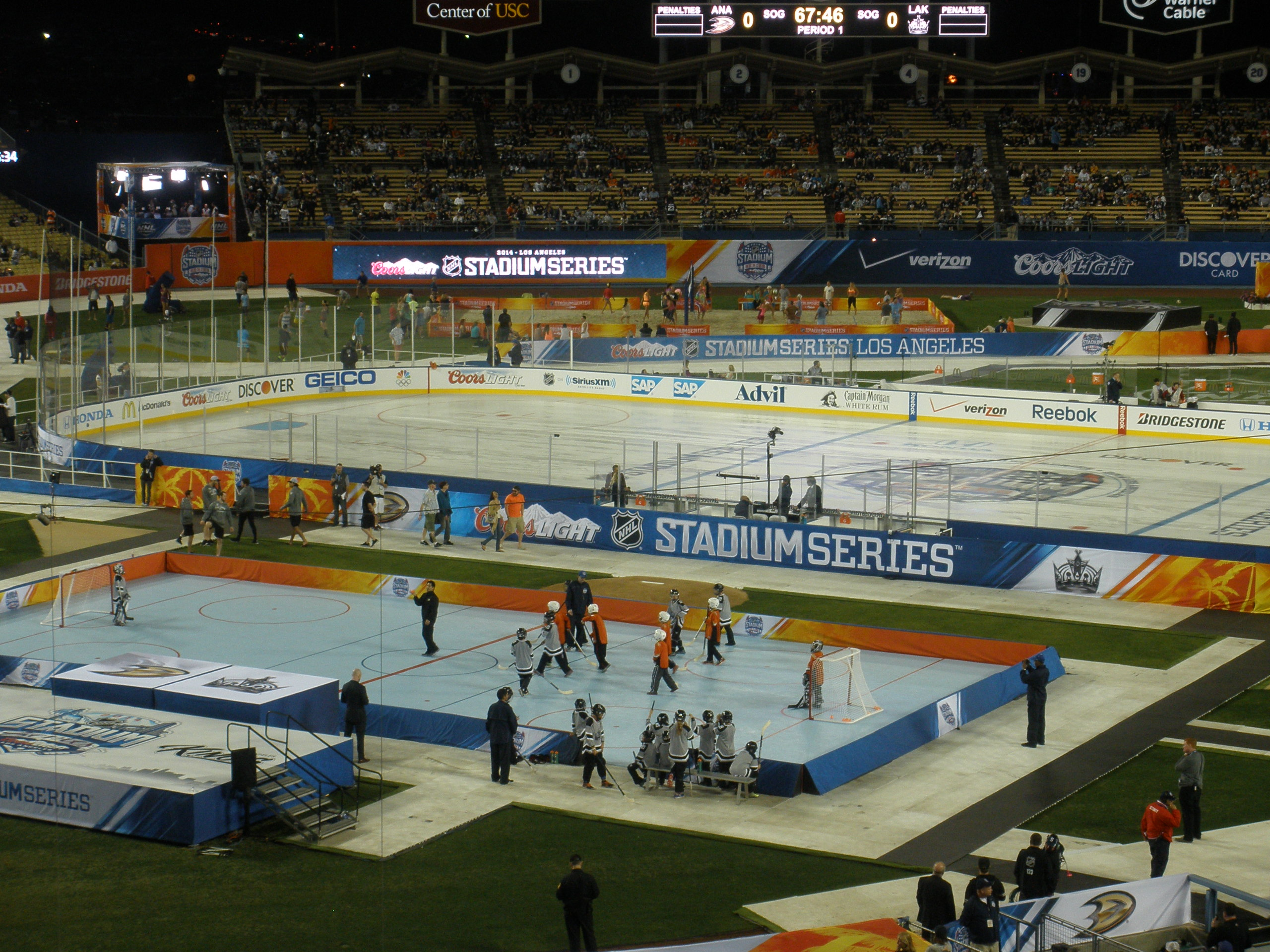 NHL Stadium Series Ducks Kings